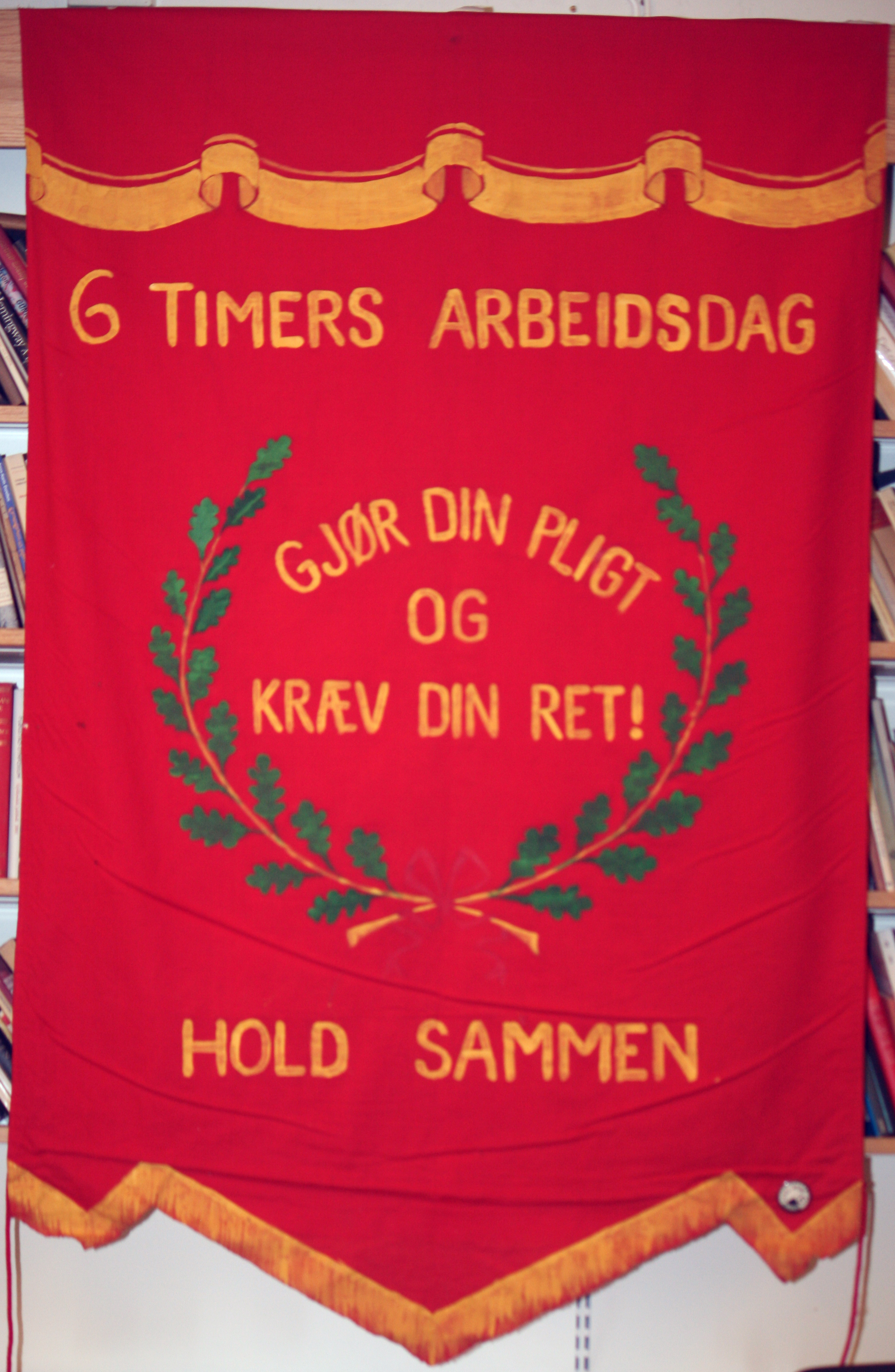 Fane utlånt fra fagforeningene i Sulitjelma i forbindelse med konferansen «100 år med åttetimersdag er nok – sekstimersdag innen 2018!» i Oslo 1. mars 2013. Fotokreditering: sekstimersdagen.no